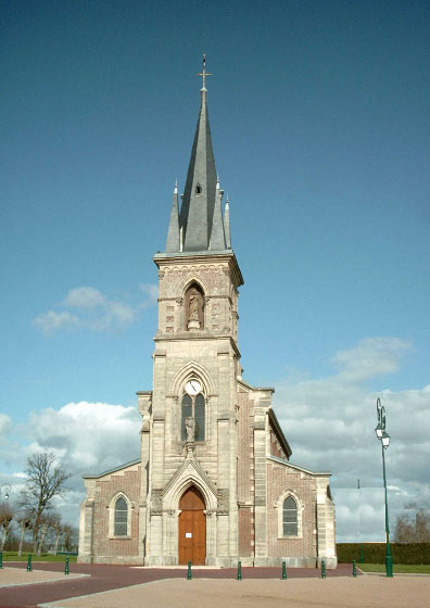 Église de Beaufai